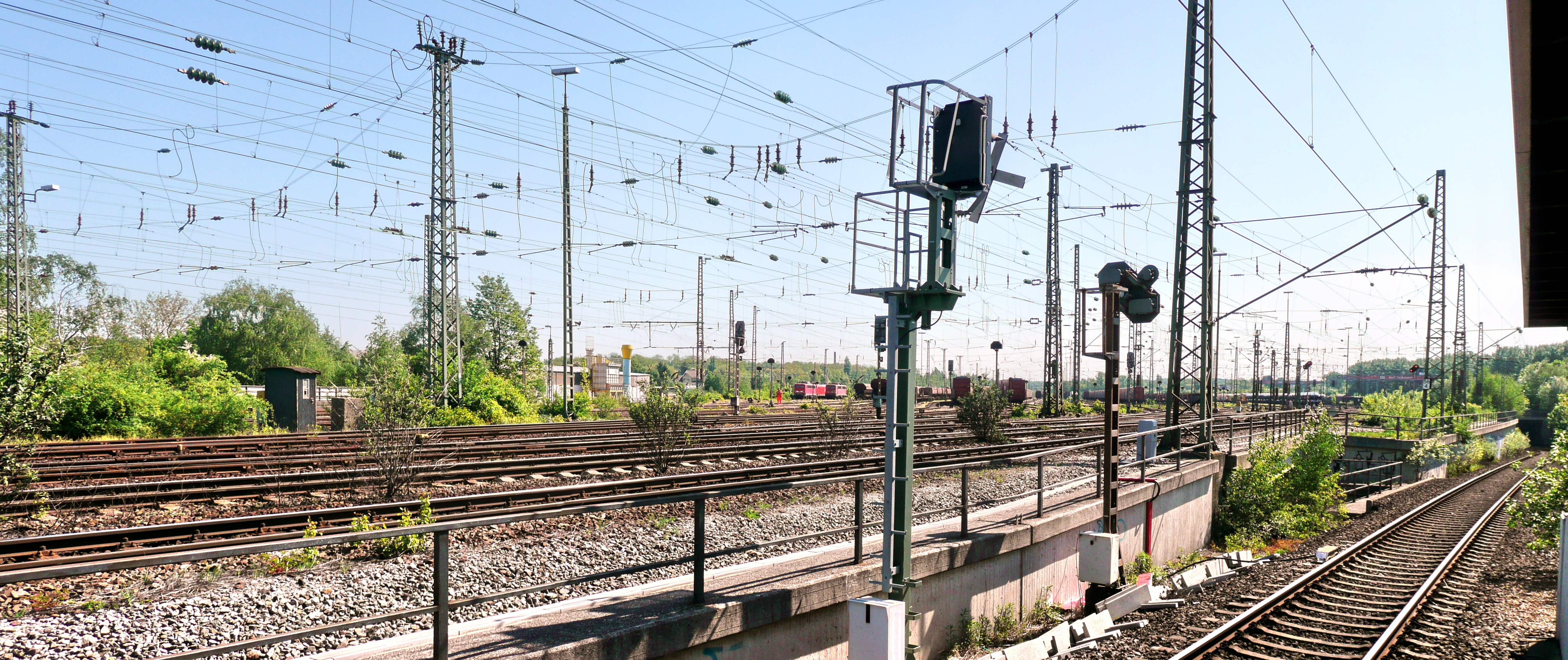 Östliche Rangierfelder und das Containerterminal des Rangierbahnhofs Bochum-Langendreer